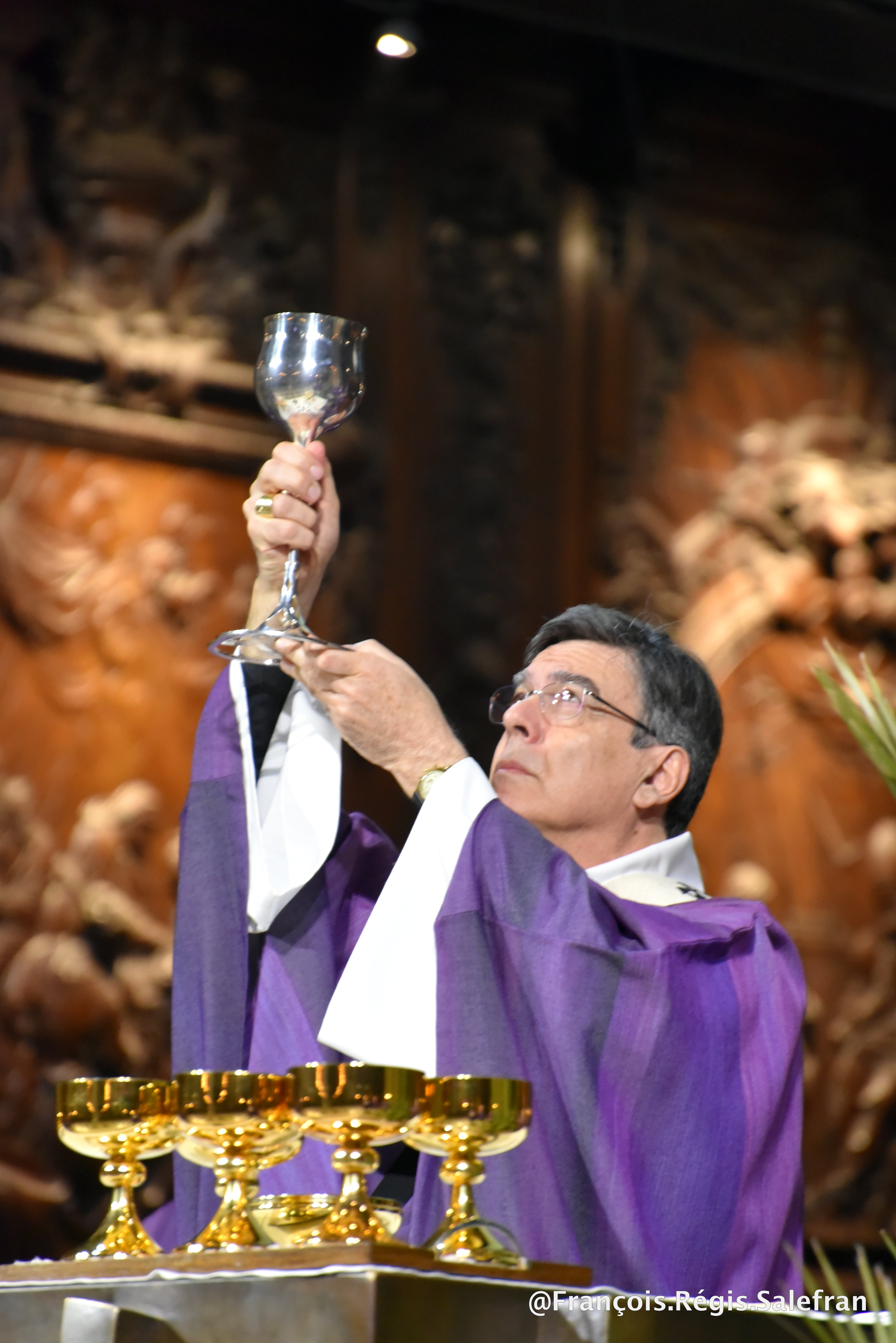 Mgr Michel Aupetit lors de la 11ème Nuit des Témoins d'Aide à l'Église en Détresse à Paris.